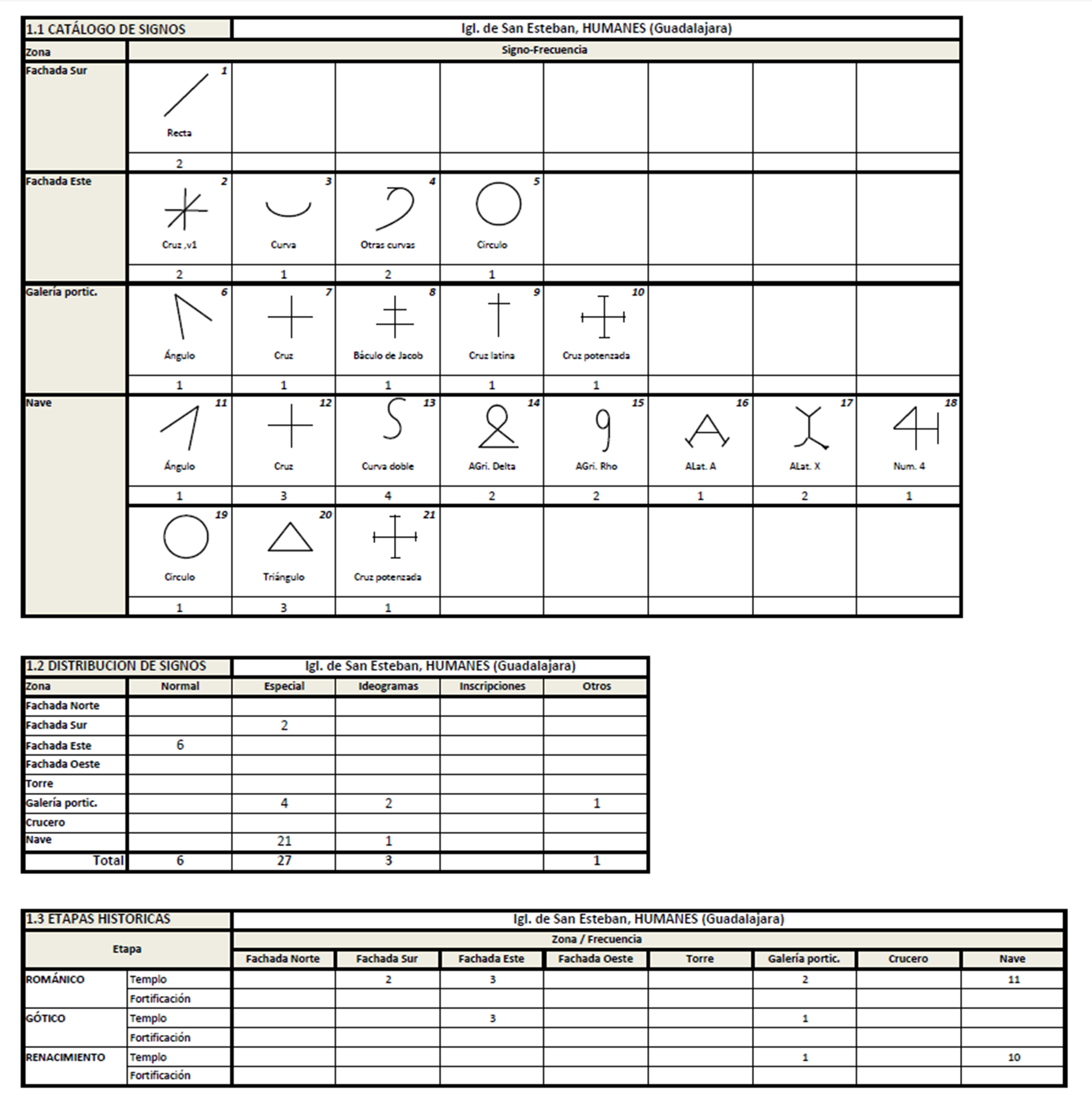 Iglesia de San Esteban, HUMANES (Guadalajara) España; románico rural s XVI. Catálogo de Signos lapidarios.